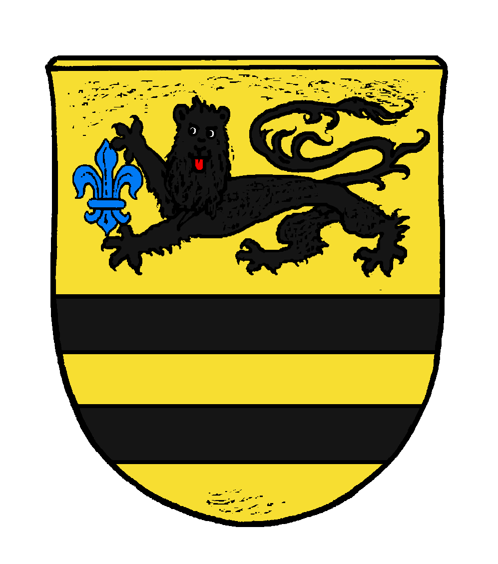 Stammwappen der Wagner, altes, aus Königsberg i. Pr. stammendes Patriziergeschlecht, 1541 von Kaiser Karl V. geadelt.